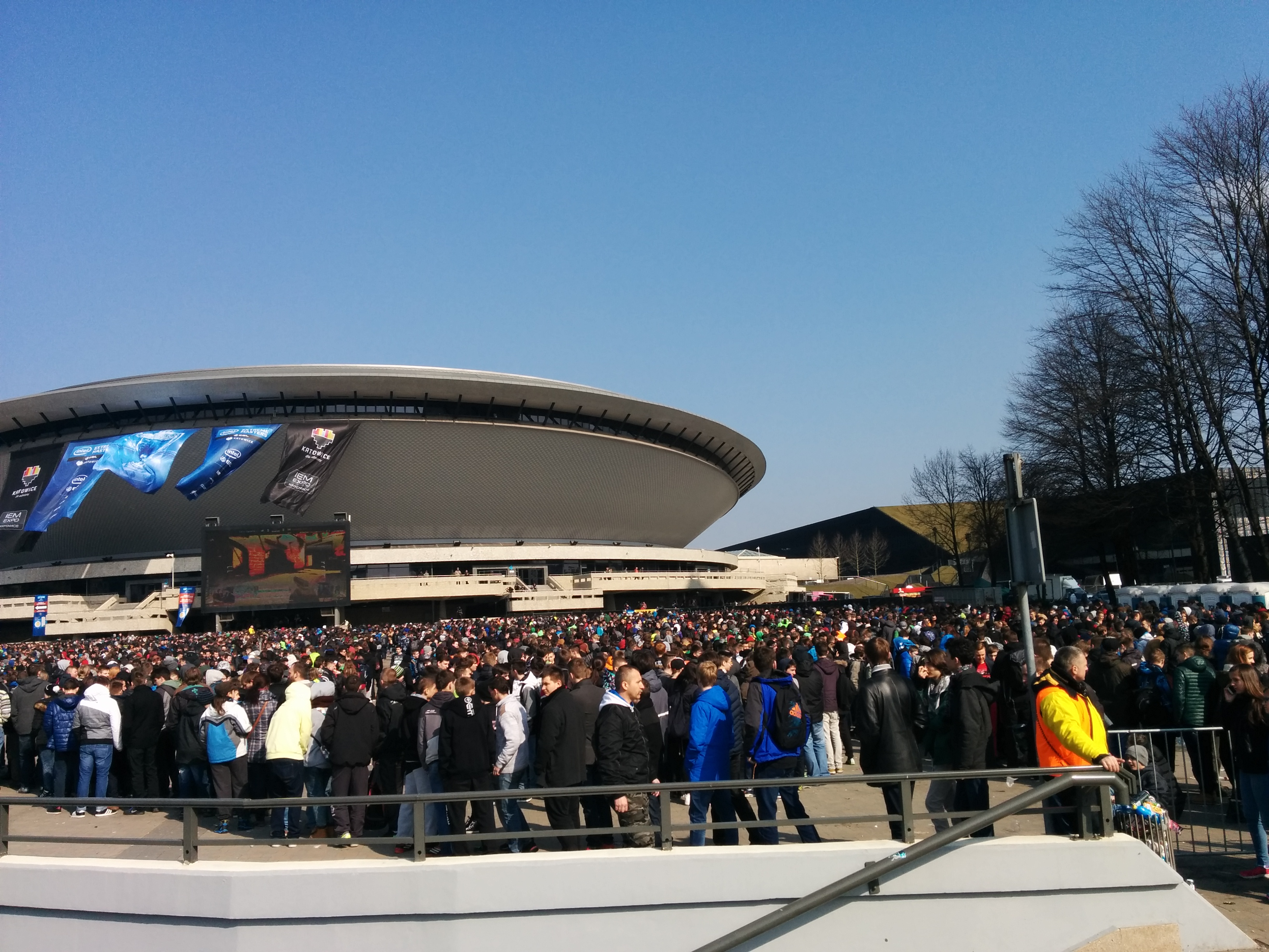 Zuschauer verfolgen die ESL One Katowice 2015 im Public Vieweing vor dem Spodek